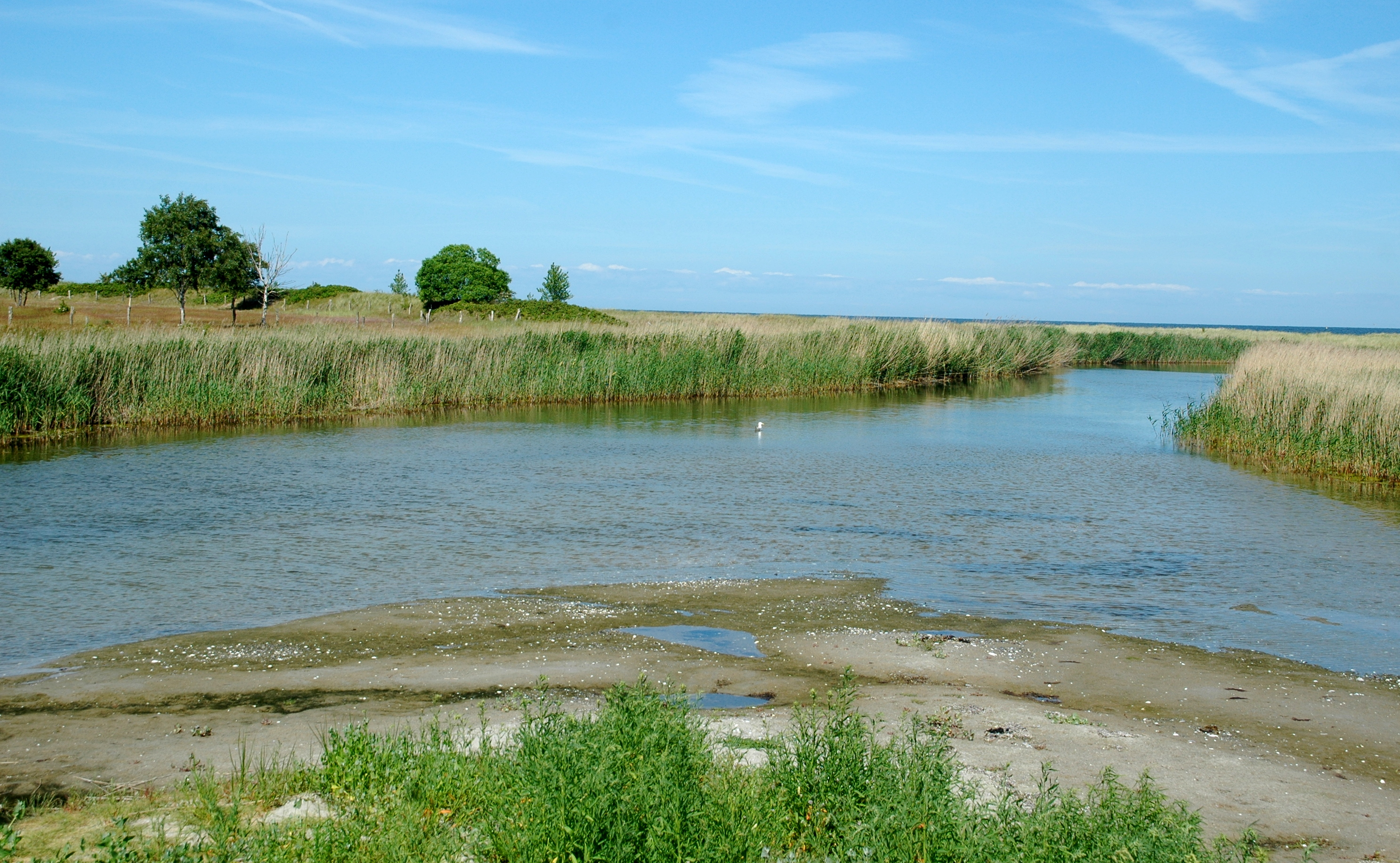 Blick auf den Broeck der den Sehlendorfer Binnensee direkt mit der Ostsee verbindet